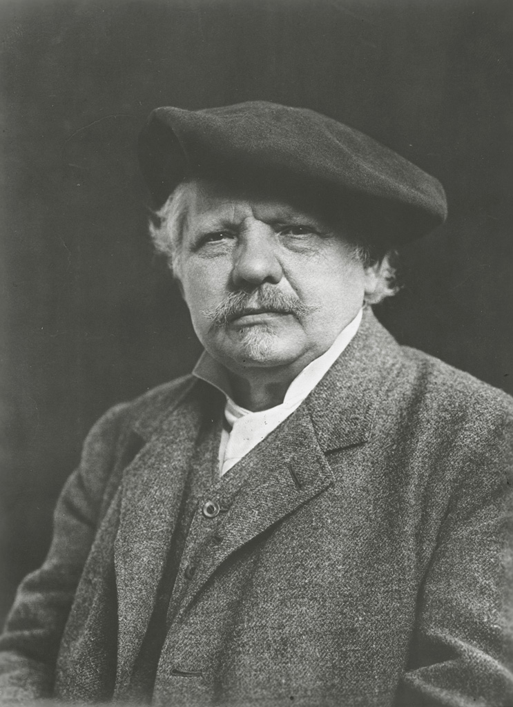 Karel Václav Klíč (1841 - 1926), Český malíř, fotograf a grafický technik.